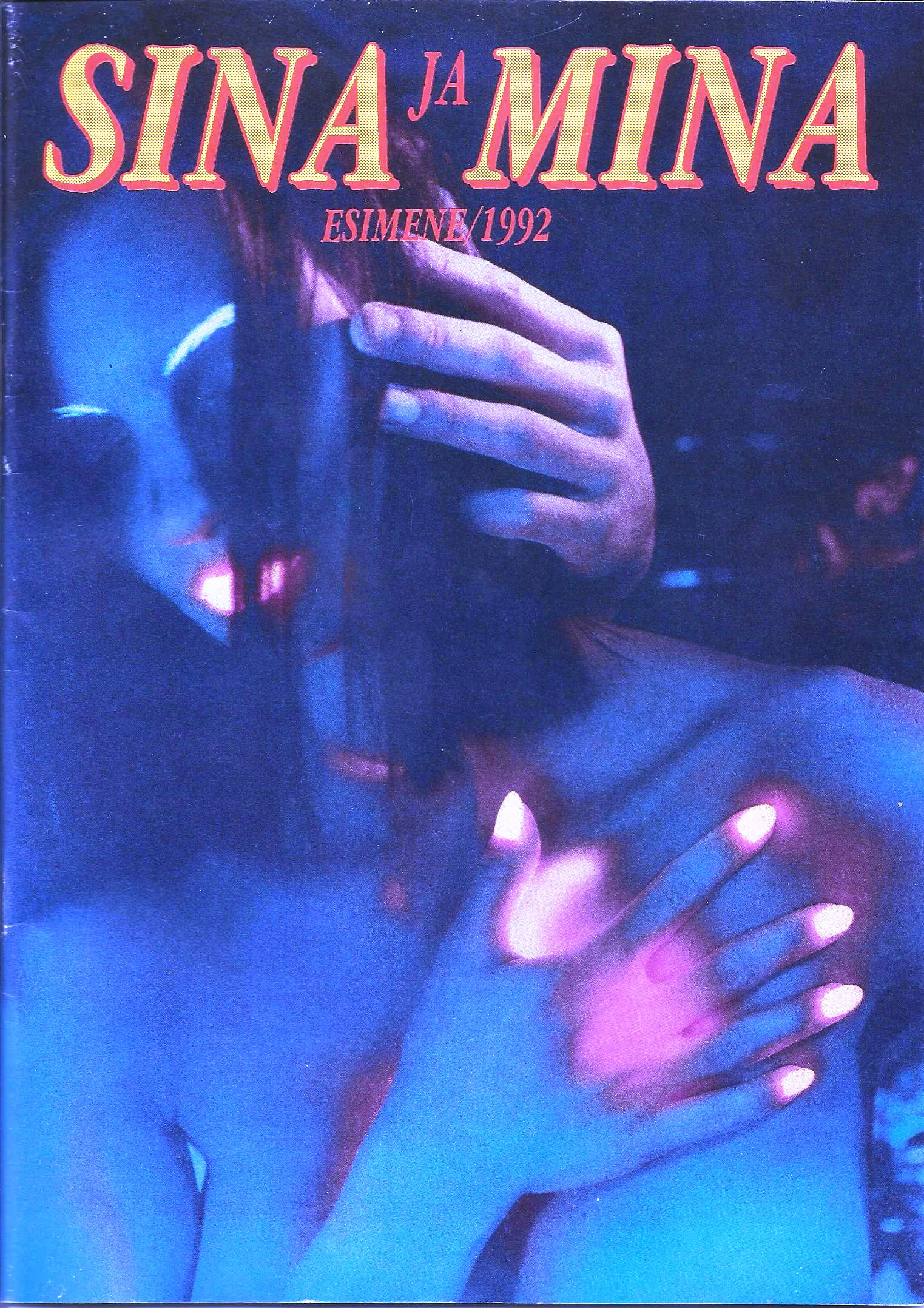 Ajakirja Sina ja Mina 1992, nr. 1 esikaas.